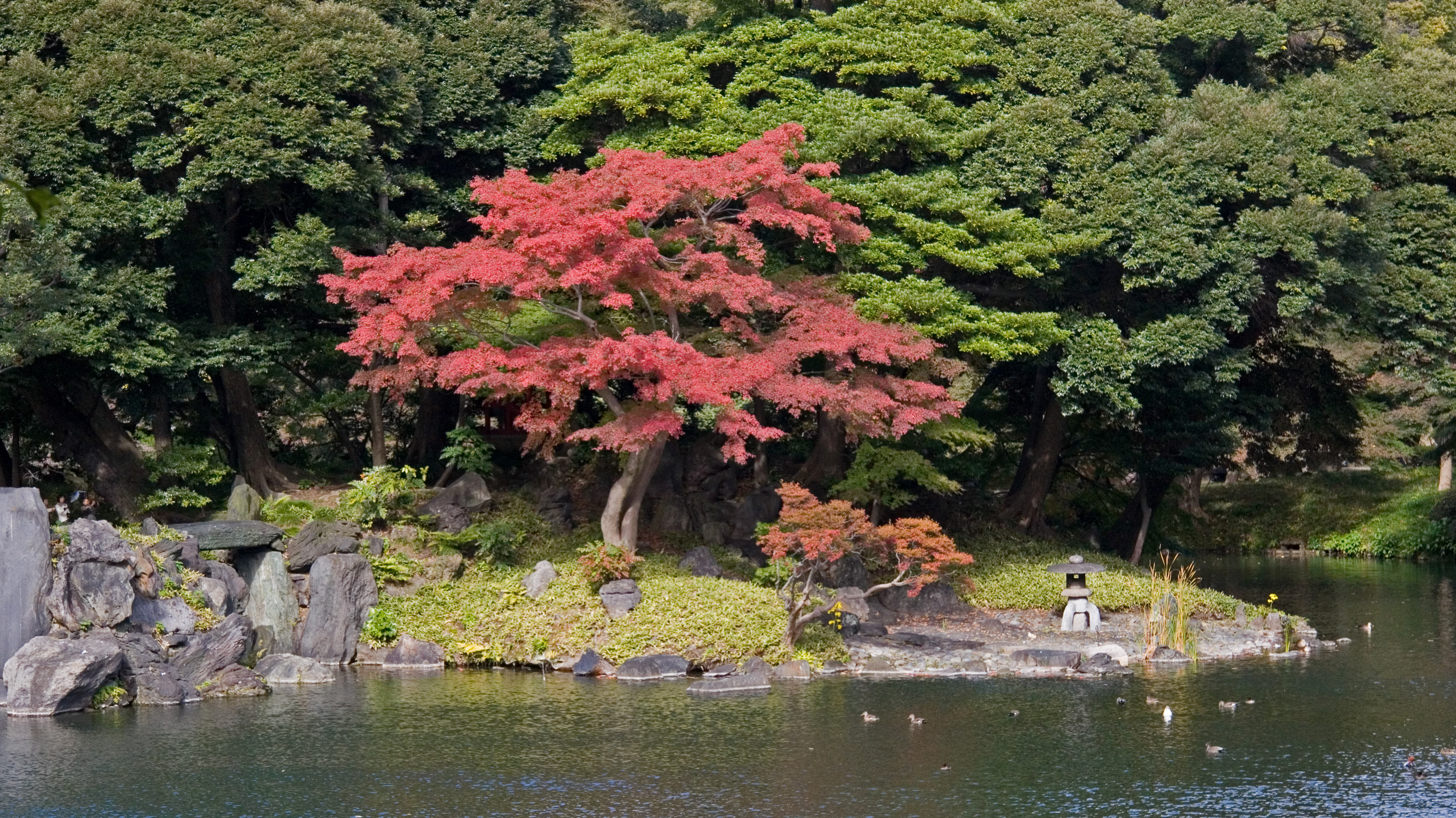 Koishikawa Korakuen garden (Tokyo, Japan) - Benzai-Tenno-Miya shrine on Horaijima (Horai island)